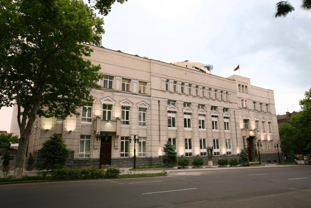 ՀՀ կենտրոնական բանկի շենքը